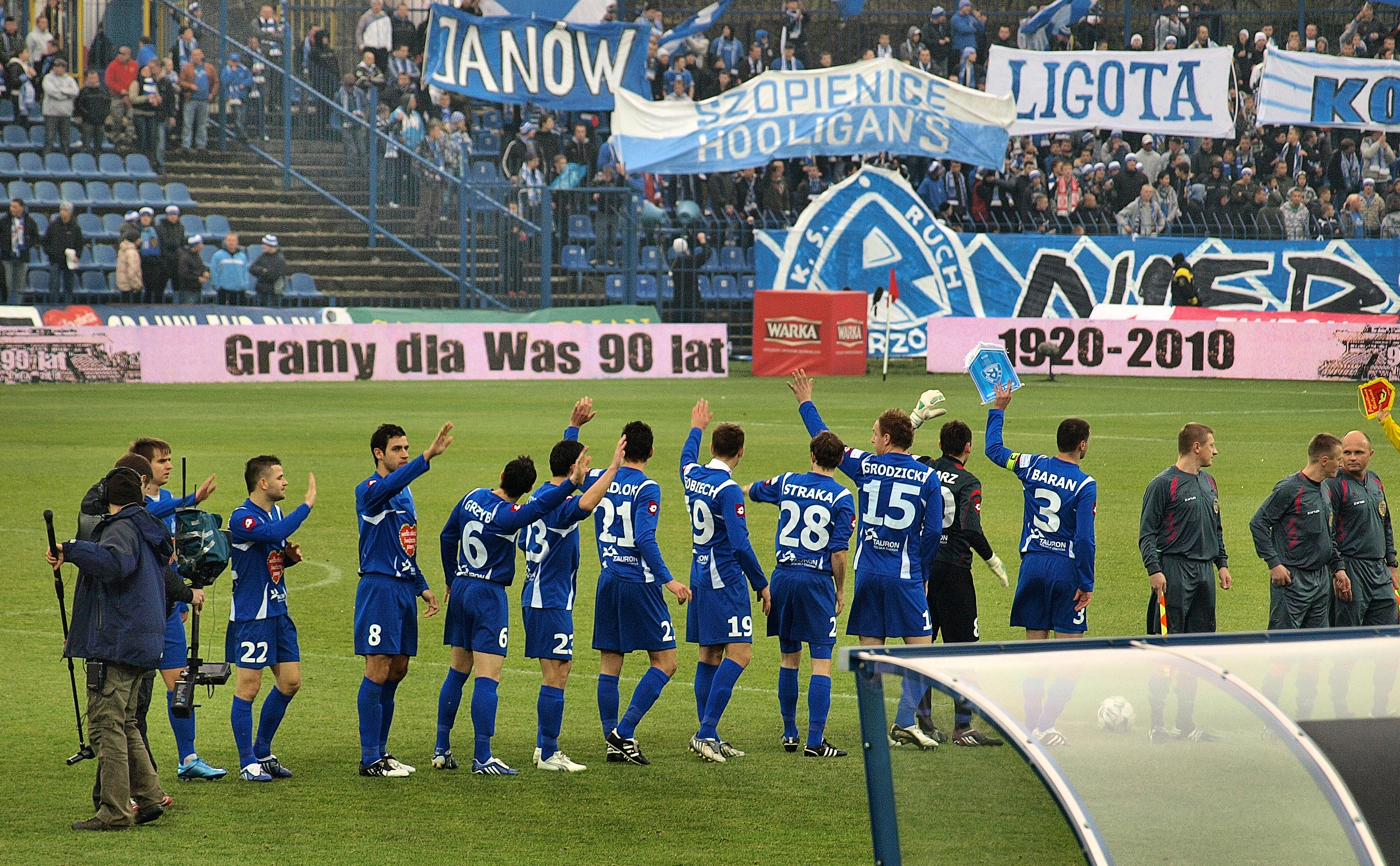 Mecz Ruchu Chorzów z Jagiellonią Białystok w esktraklasie